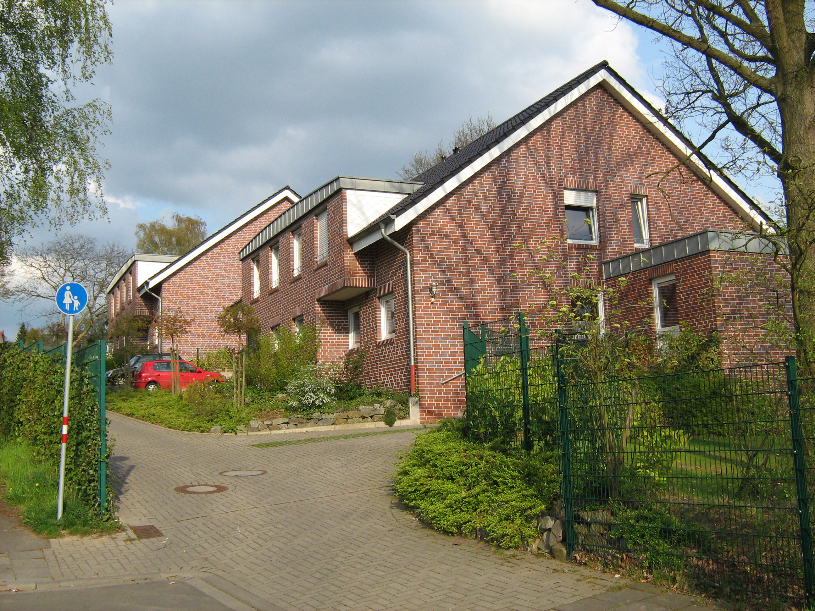 Haus 2 der Don Bosco Kath. Jugendhilfe in Osnabrück